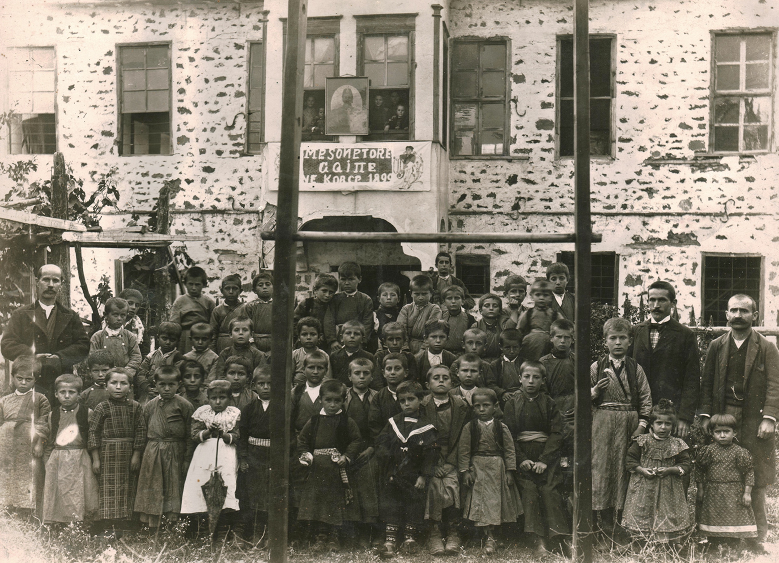 First Albanian school of Korçë Mësonjëtorja, 1899